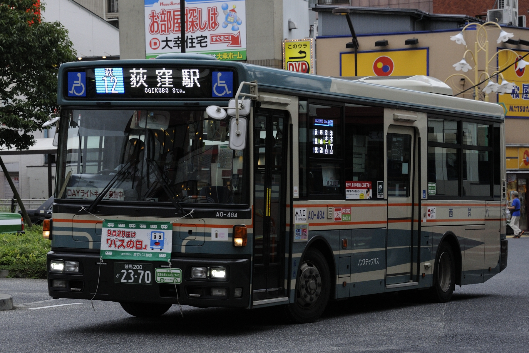 マイラーが2016年9月、JR荻窪駅前で撮影